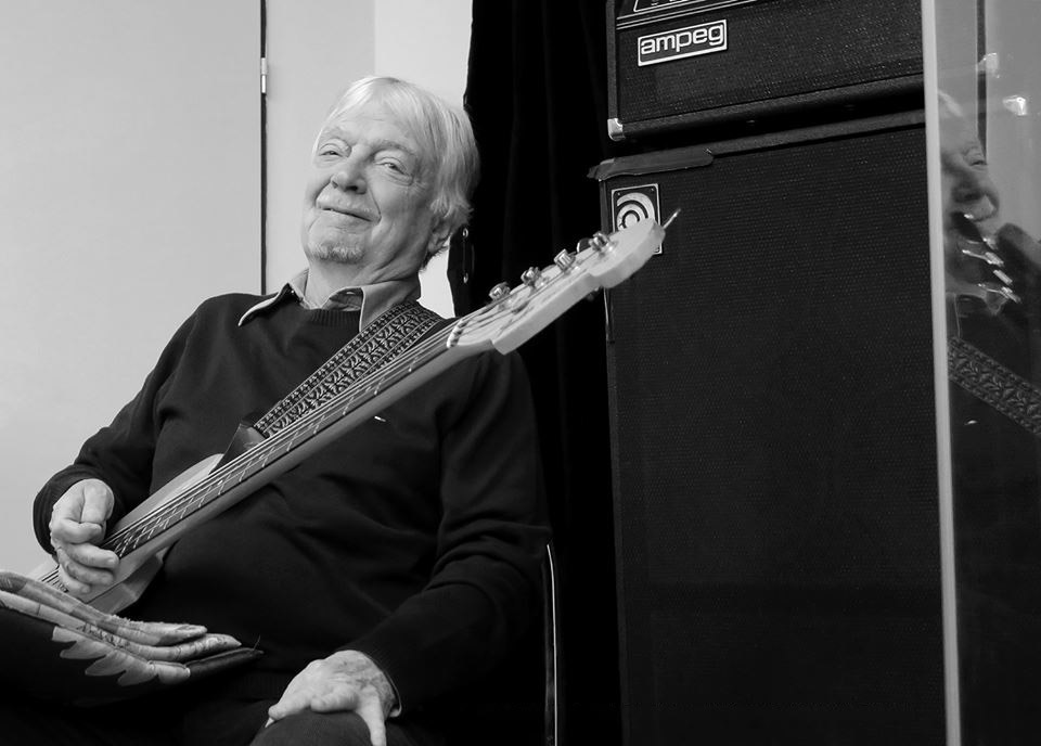 Szörényi Szabolcs (Budapest, 1943. szeptember 26. –) Kossuth-díjas magyar énekes, basszusgitáros, zeneszerző.